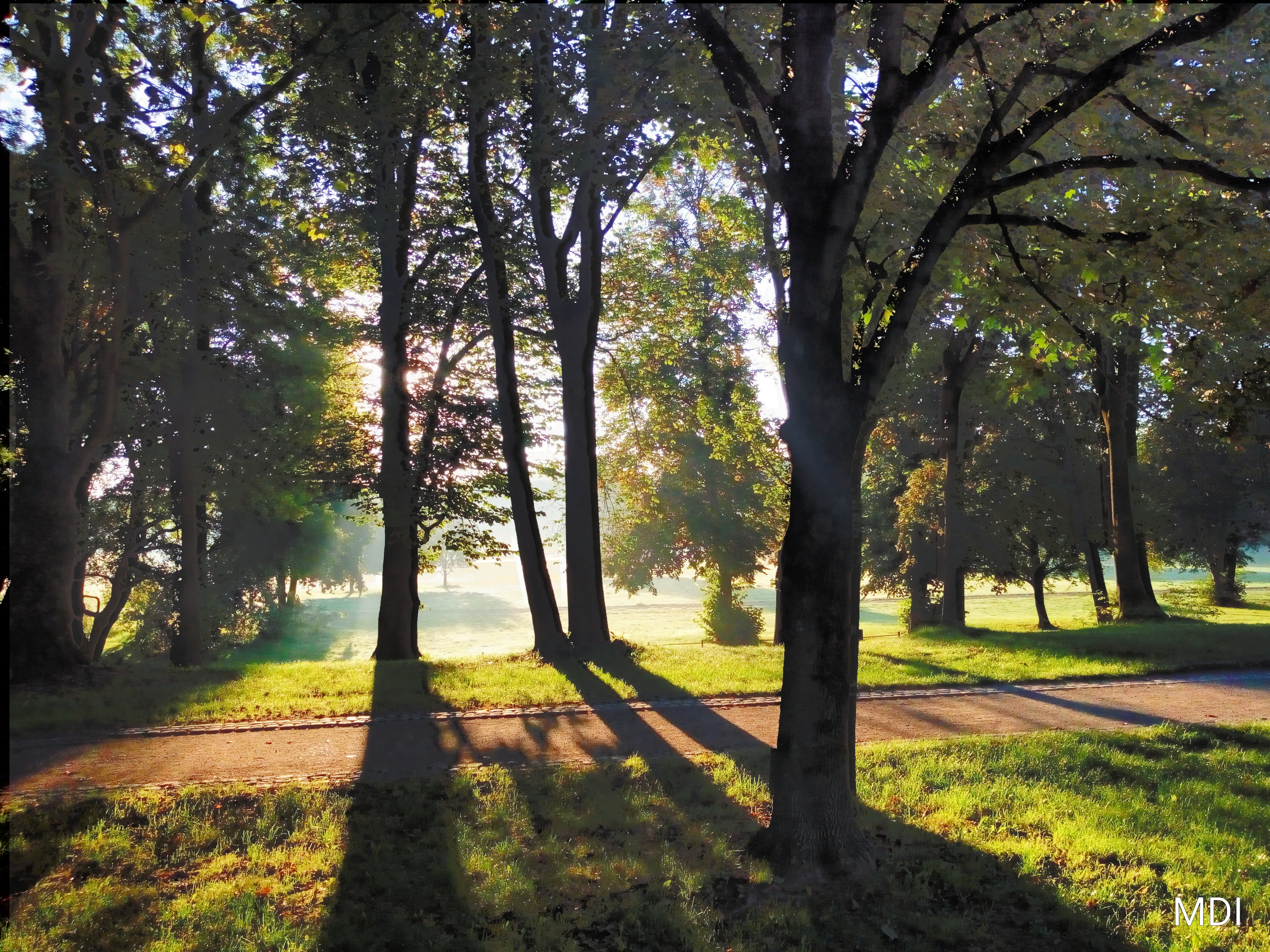 Bild des Englischen Gartens in München, aufgenommen von der Königinstraße